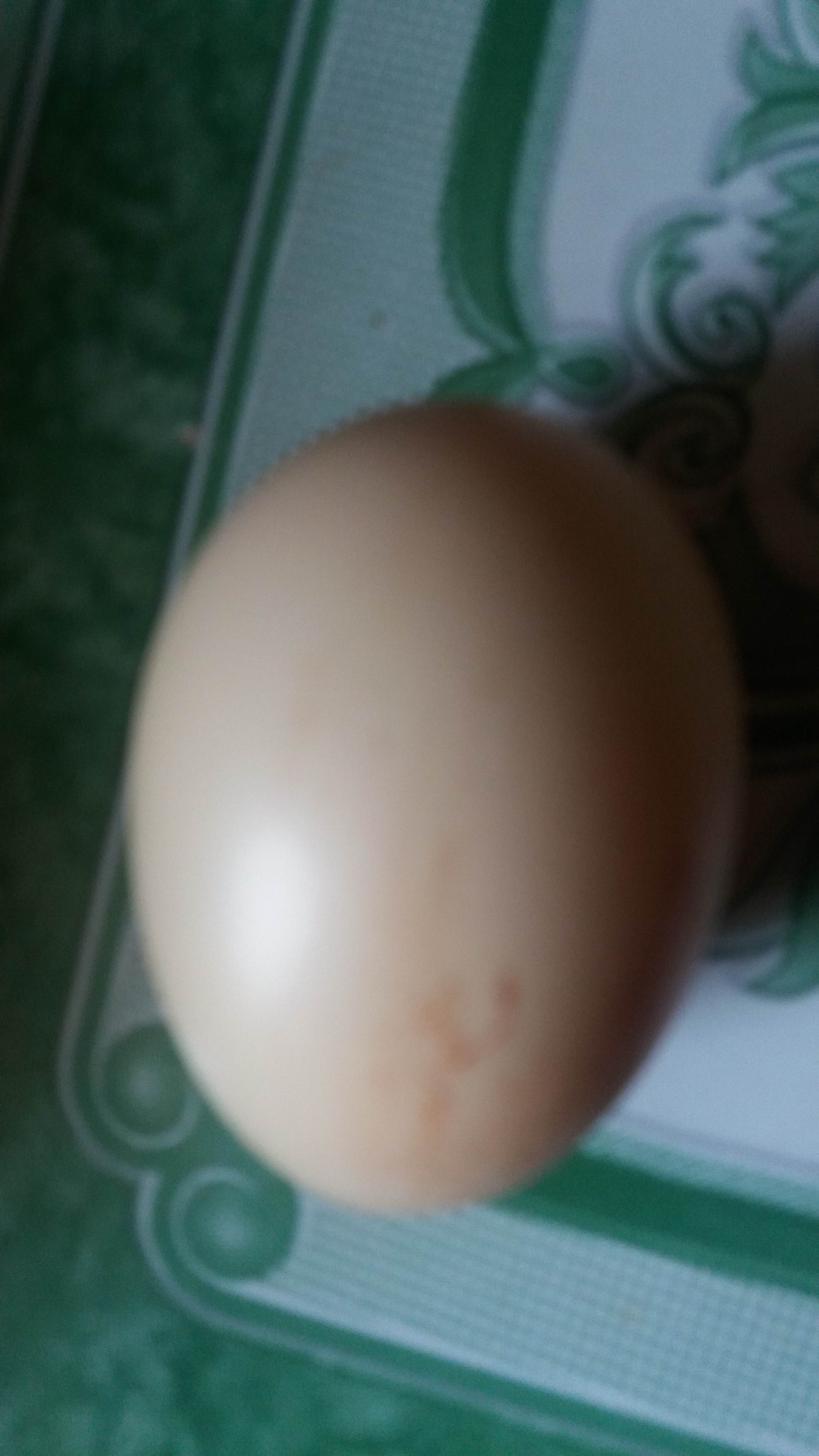 1 quả trứng